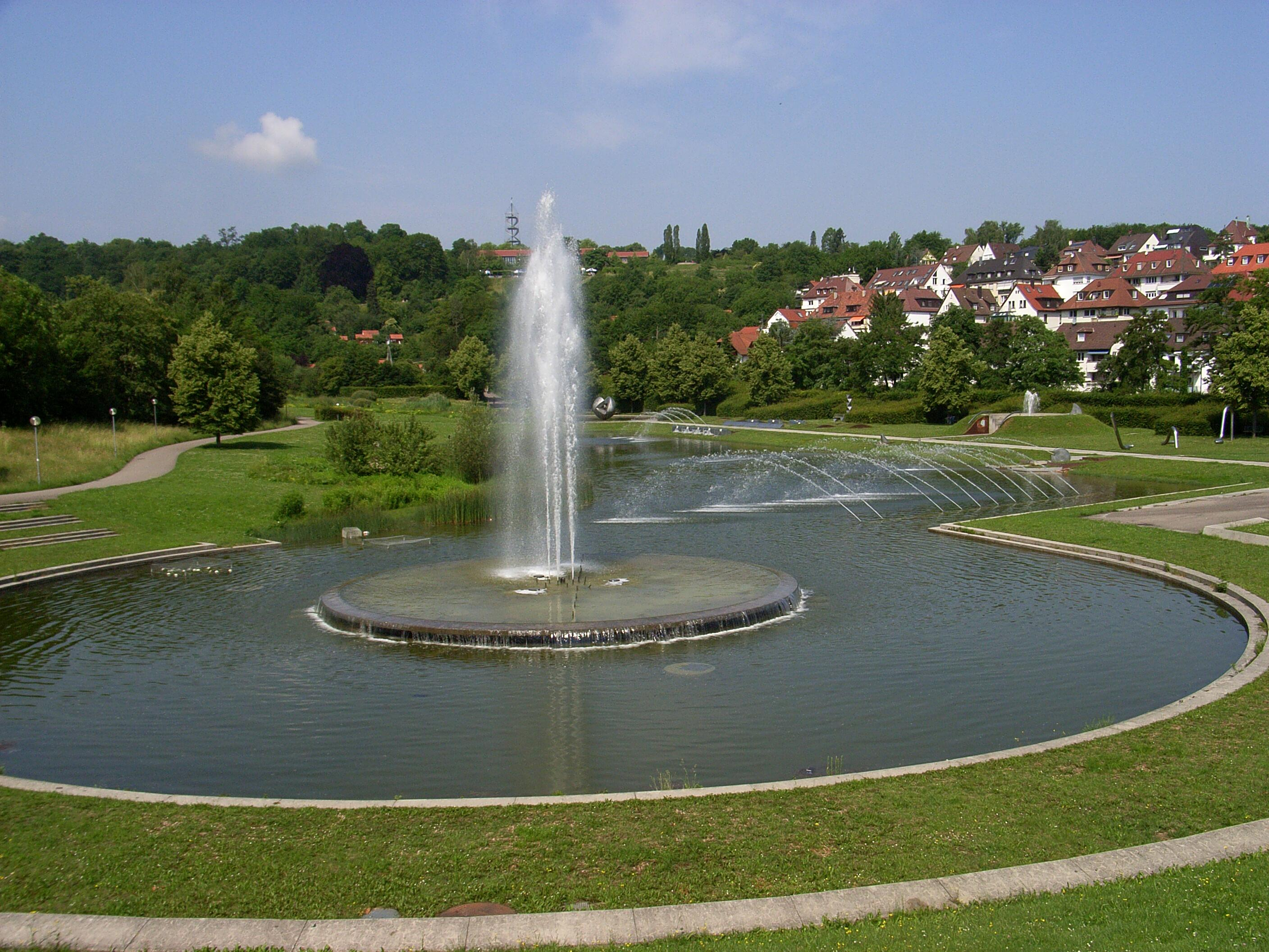 Dieses Bild zeigt den Wartberg neben dem Höhenpark Killesberg.